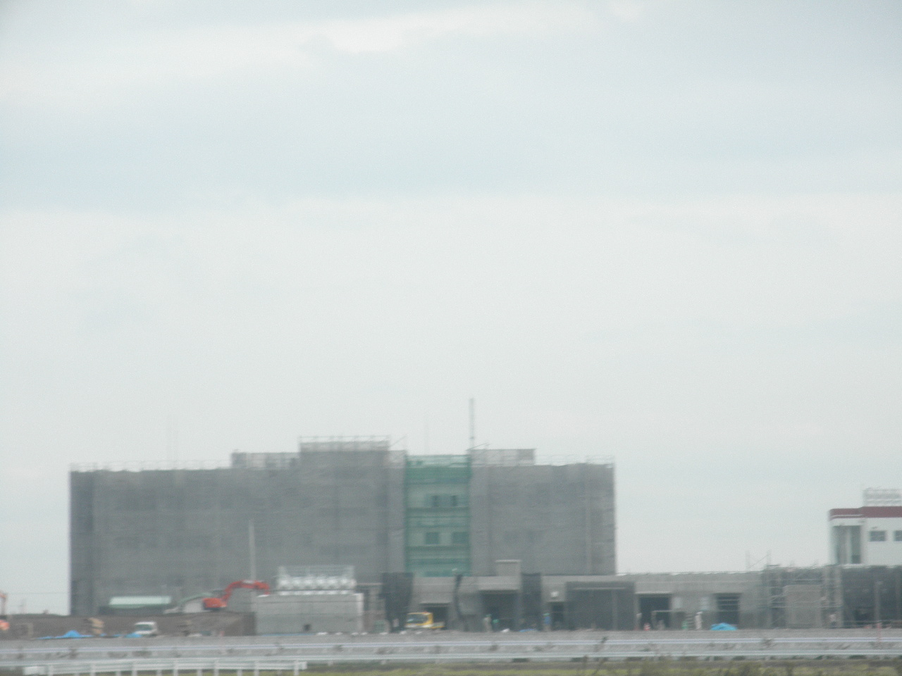 徳島駐屯地 2011年11月12日